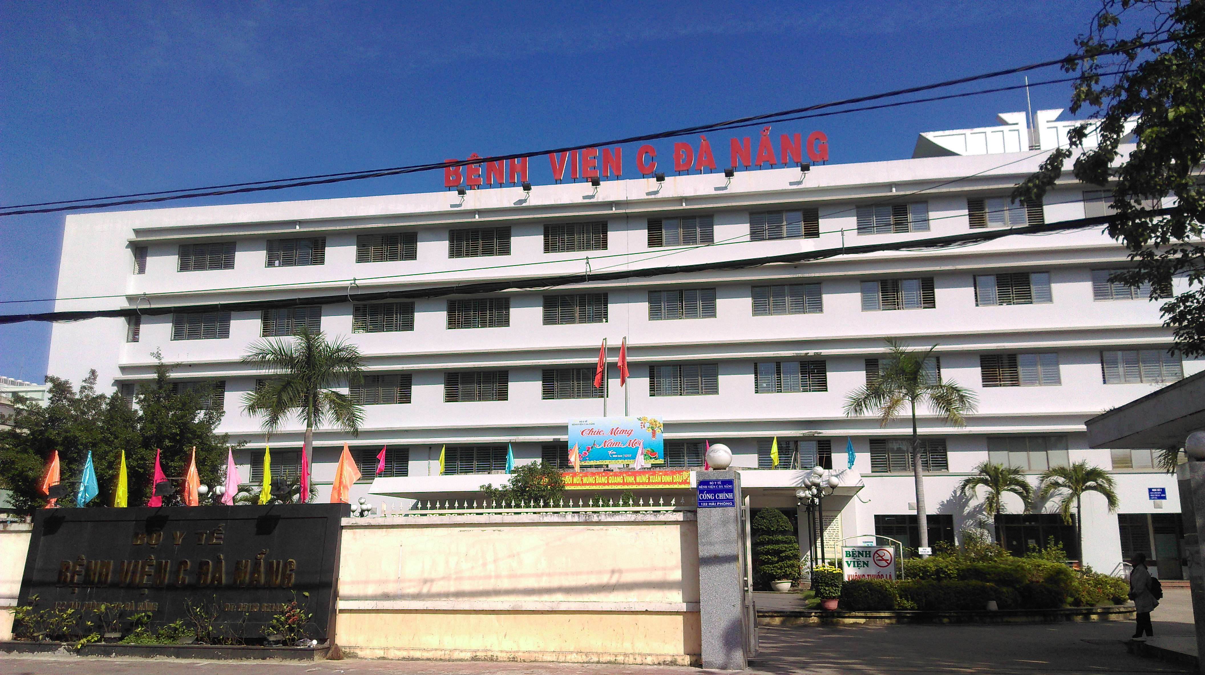 Bệnh viện C Đà Nẵng